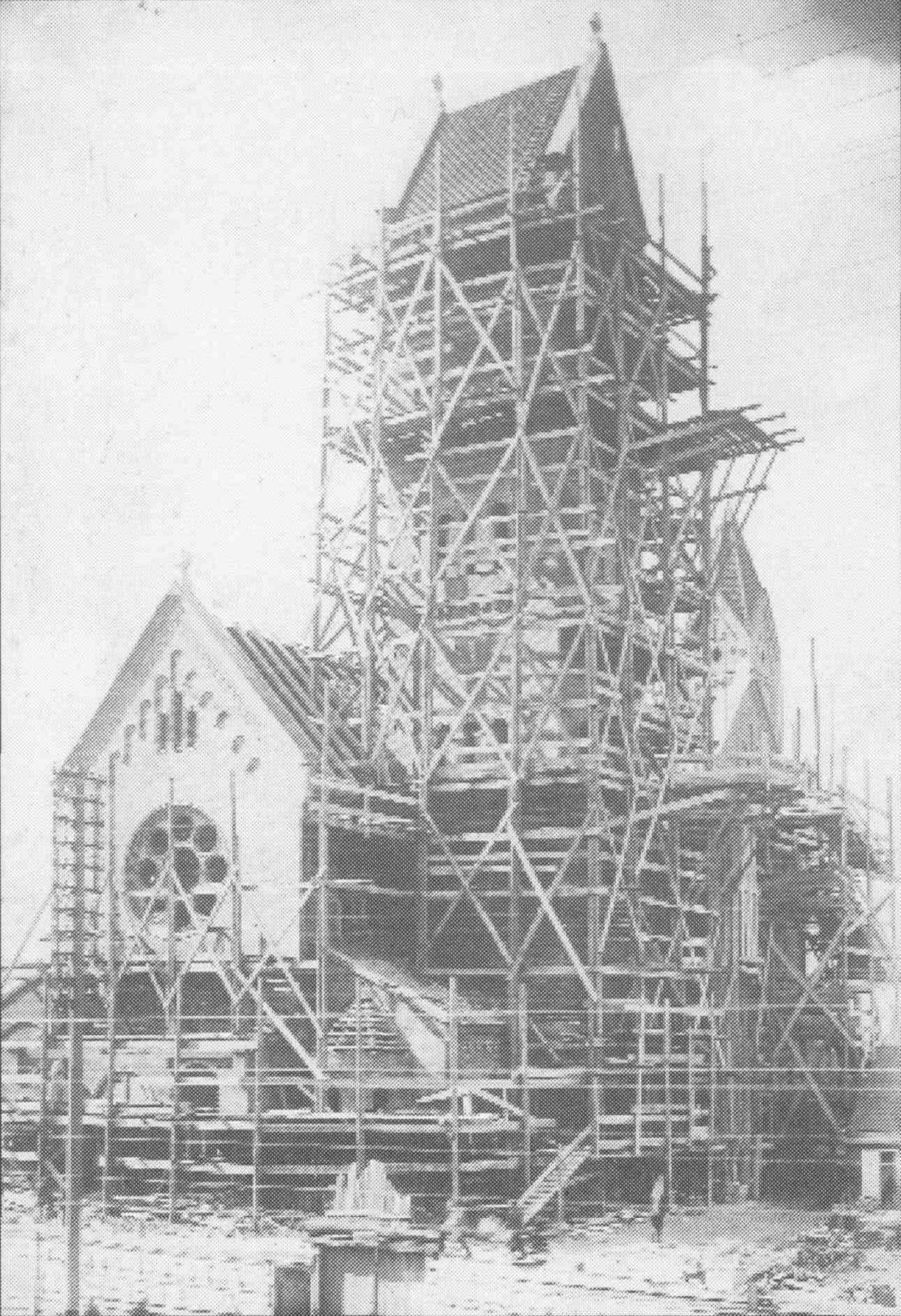 Kościół św. Szymona i św. Heleny w budowie.